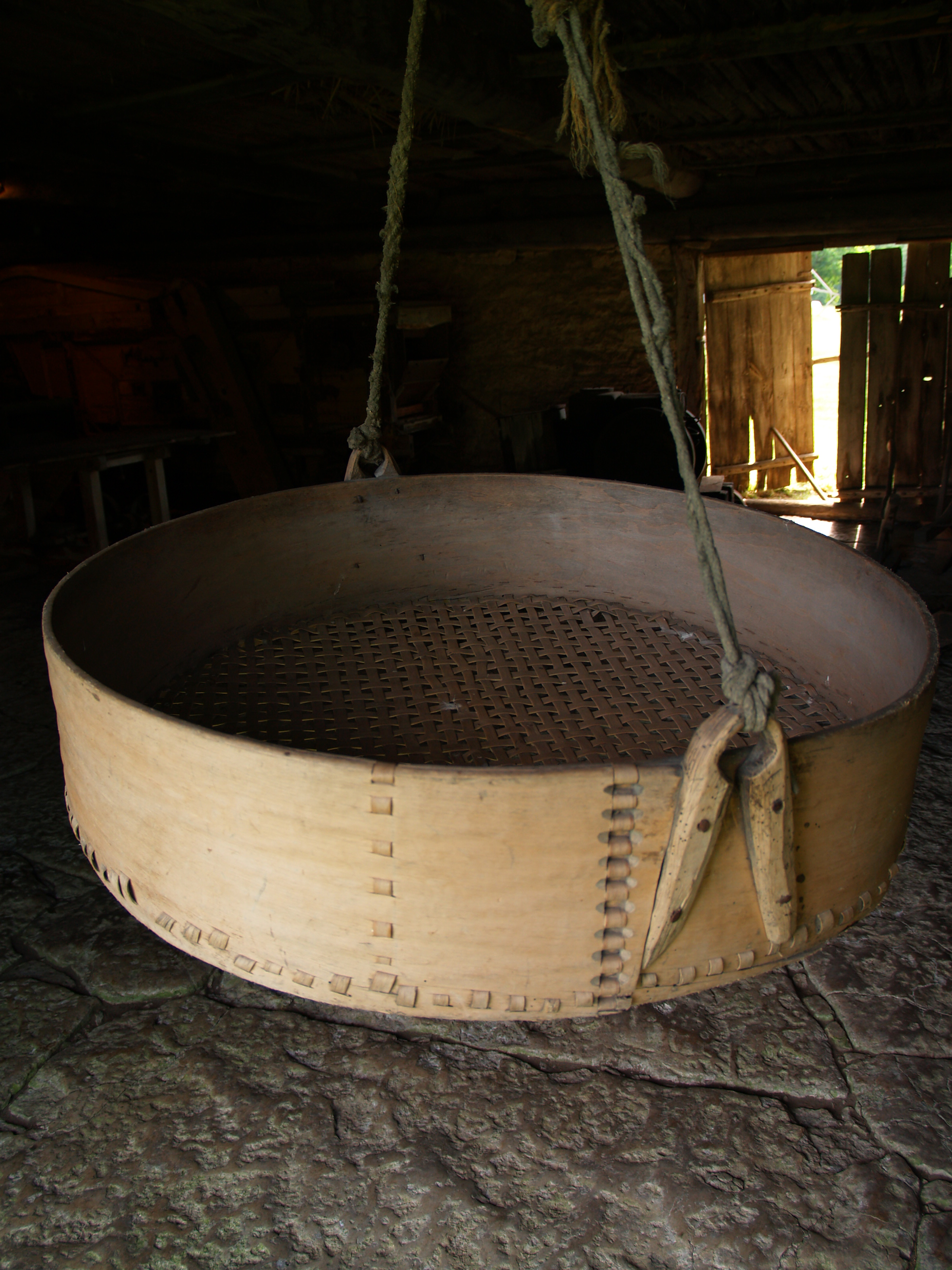 Sari Mihkli talumuuseumis.